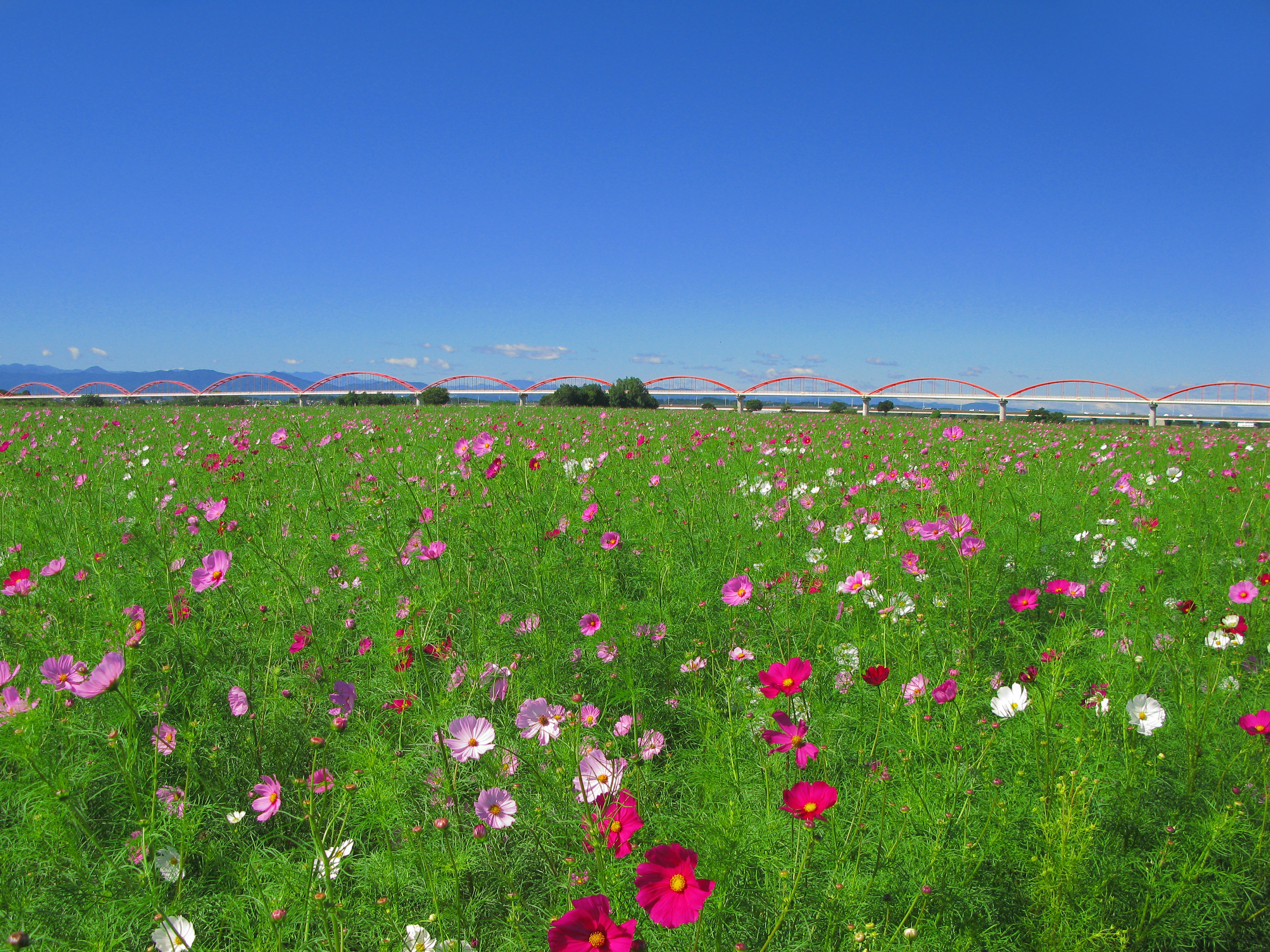 荒川 荒川水管橋（埼玉県鴻巣市） Category:鴻巣市の画像 Category:橋画像